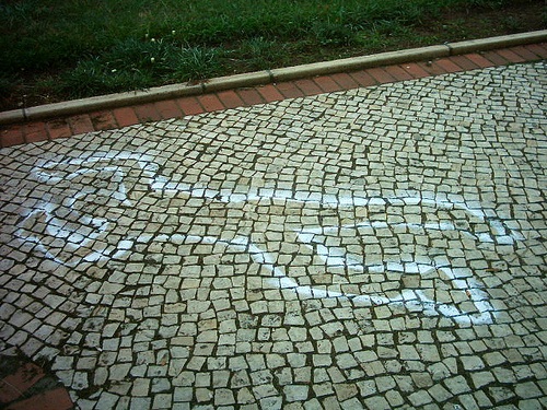 Marca de morto no empedrado.